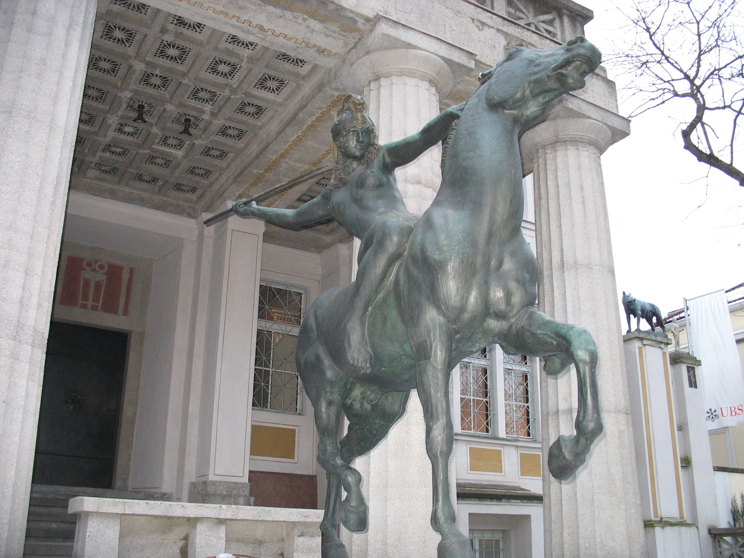 Amazone vor der Villa Stuck, München